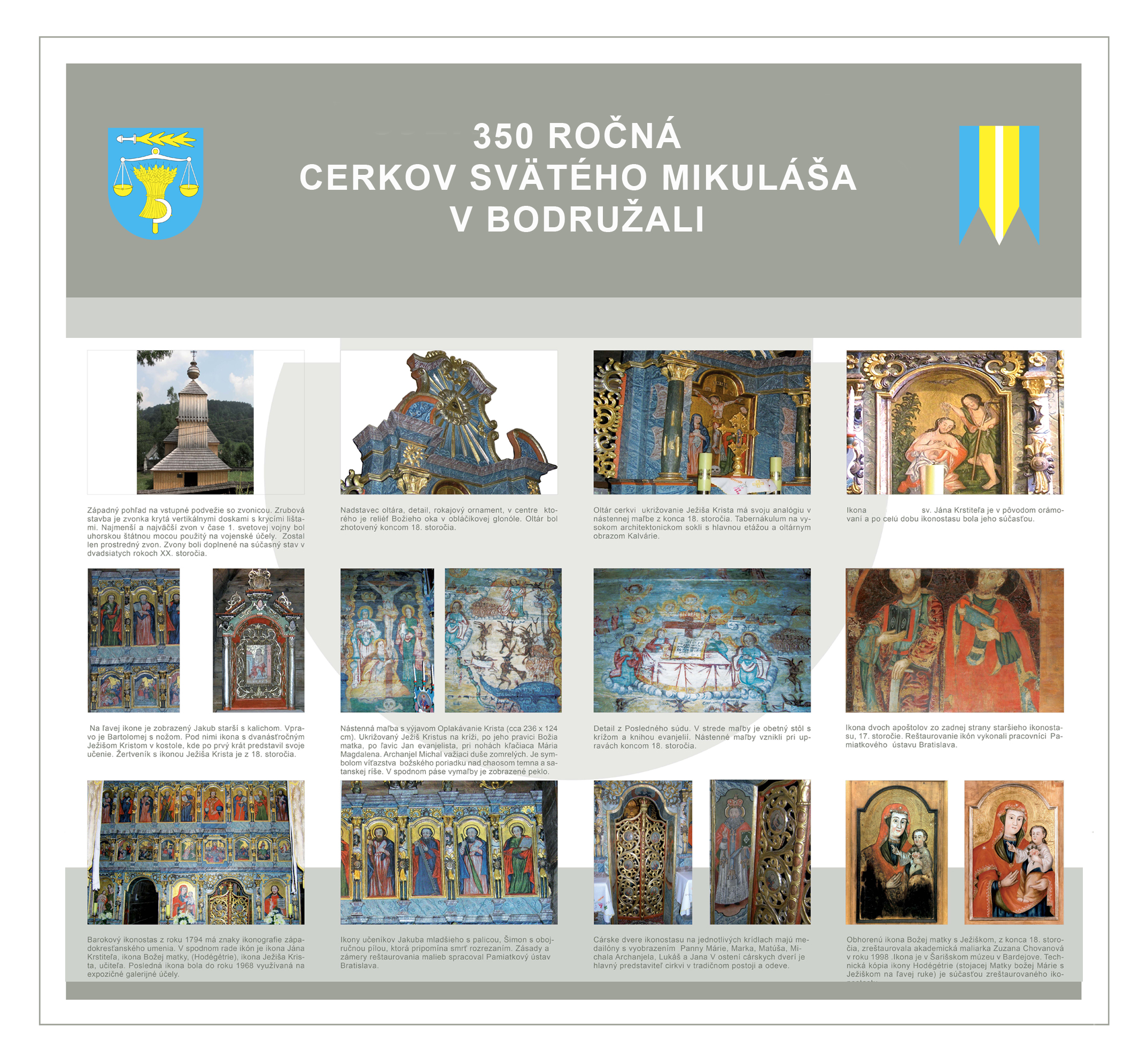 Plagát k 350. výročiu cerkvi svätého Mikuláša v Bodružali.Chrám sv. Mikuláša, bol postavený v roku 1658 a hoci bol niekoľkokrát opravovaný, patrí medzi najstaršie a najlepšie zachované chrámy východného obradu na Slovensku. Jeho 3-dielny zrub vymedzuje priestor vstupného podvežia, lode a svätyne s rovným uzáverom. Túto typickú dispozíciu už na prvý pohľad zdôrazňuje stupňovité zastrešenie s vežami stanového tvaru a drevenou šindľovou krytinou. Bohatá maľovaná výzdoba z 18. storočia sa zachovala na severnej strane lode, kde dominuje nástenná maľba Kalvárie, Posledného súdu a Ukrižovania. Ikonostas s niekoľkými staršími ikonami pochádza z roku 1794.